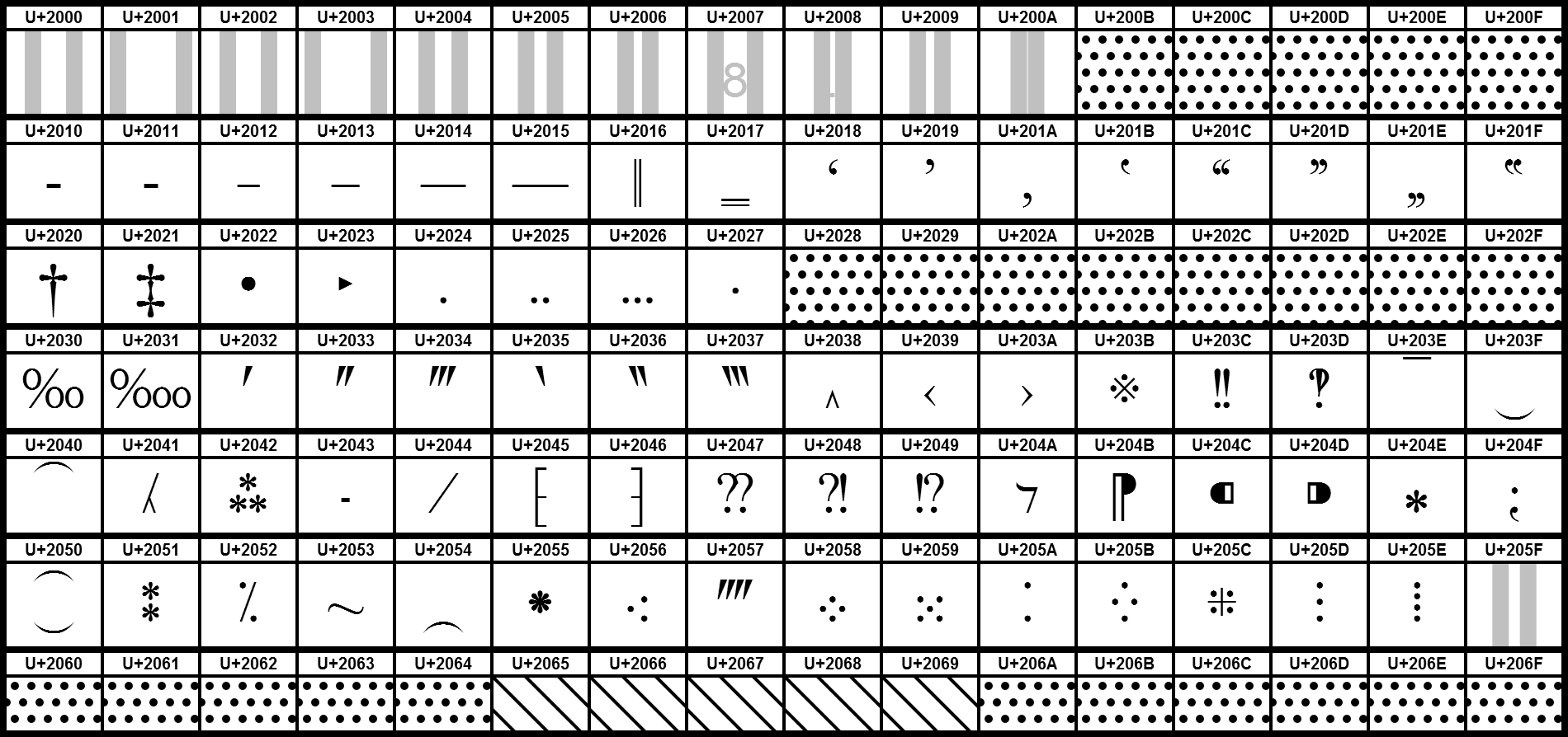 Grafiktafel für den Unicodeblock Allgemeine Interpunktion (U+2000 bis U+206F). Gepunktete Felder sind Formatierzeichen. Hellgraue Linien und Flächen dienen der Verdeutlichung und gehören nicht zum Zeichen.